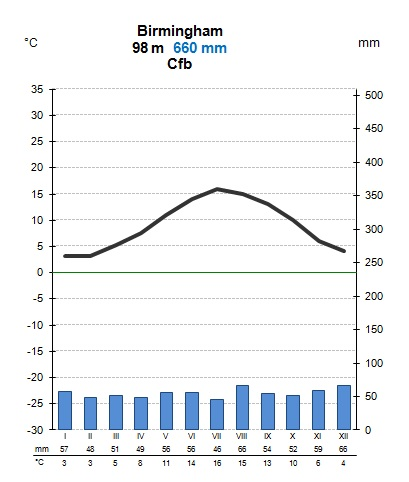 Birminghami diagraam